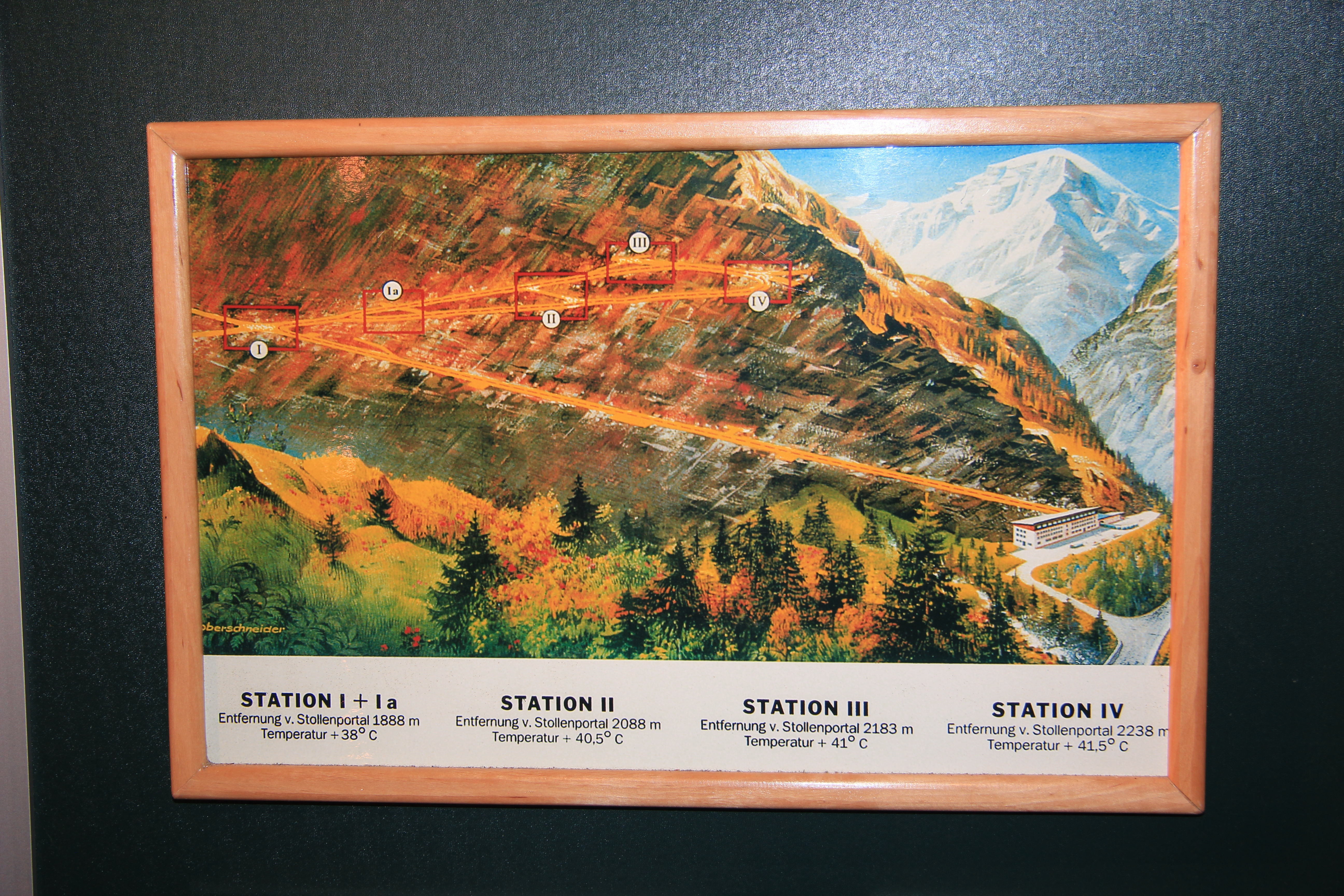 Ausstellungsstücke des Montanmuseums Altböckstein